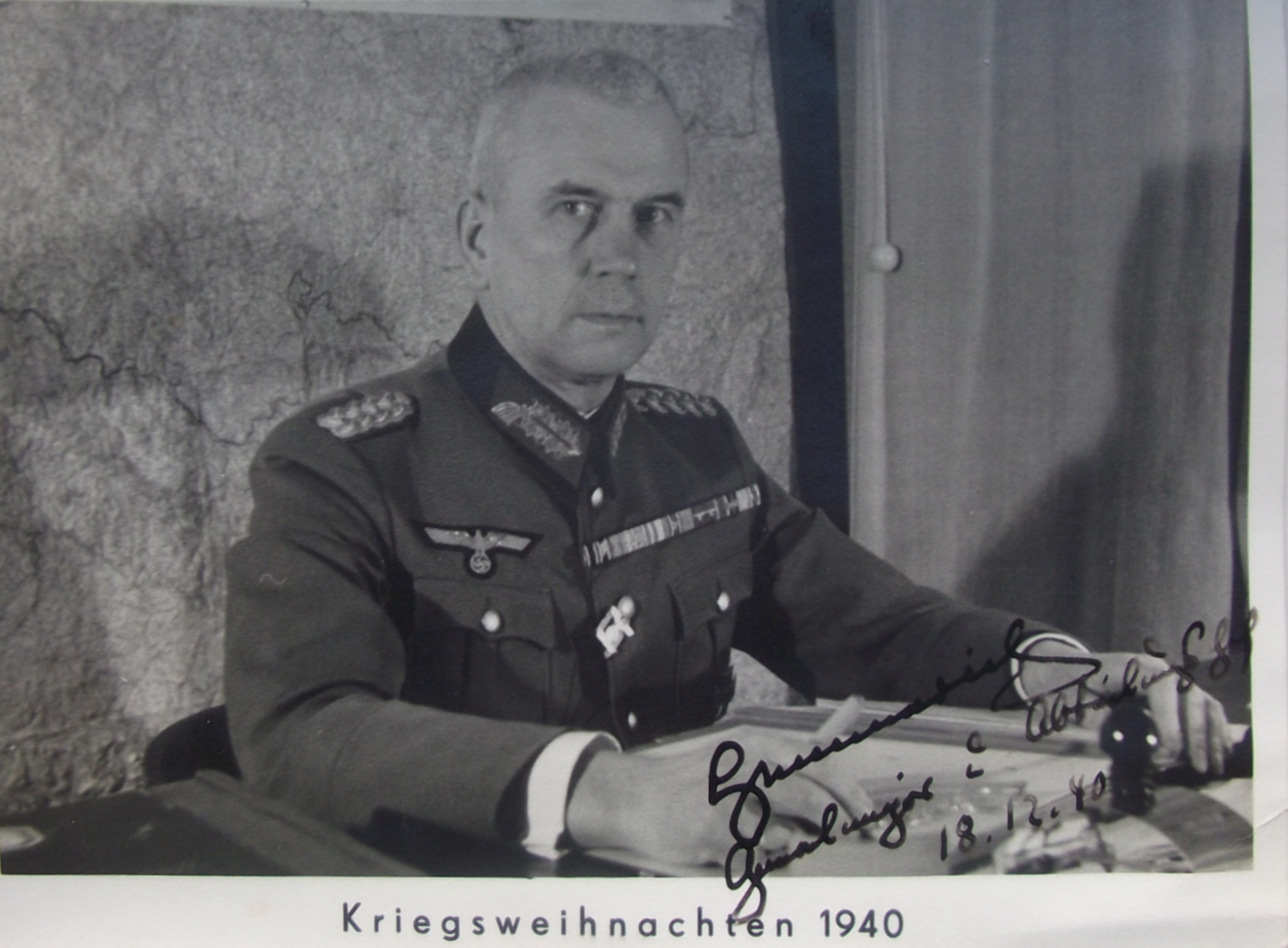 Generalmajor Gerlach Hemmerich, Weihnachtskarte 1940